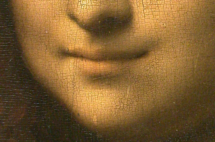 detail: mouth